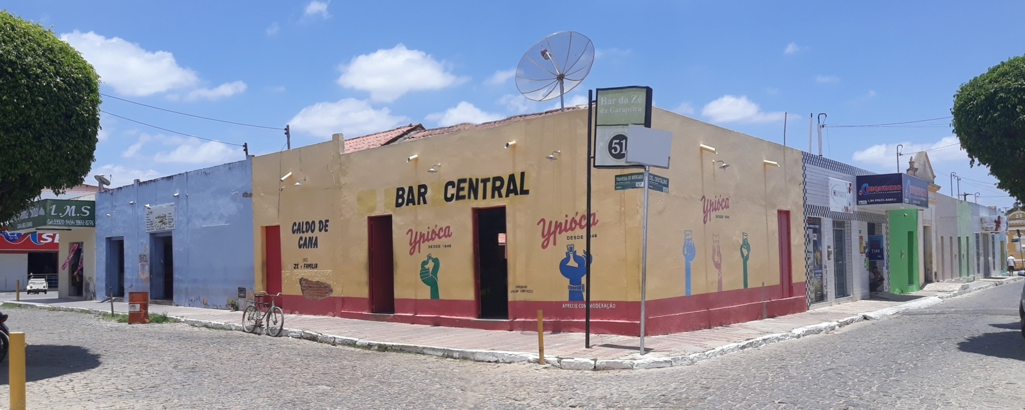 Mercado Público Municipal de Martins, Rio Grande do Norte (Brasil)